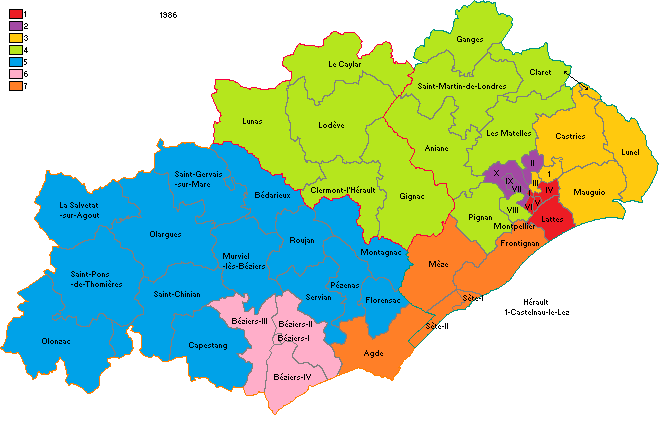 Circonscriptions héraultaises de 1986.